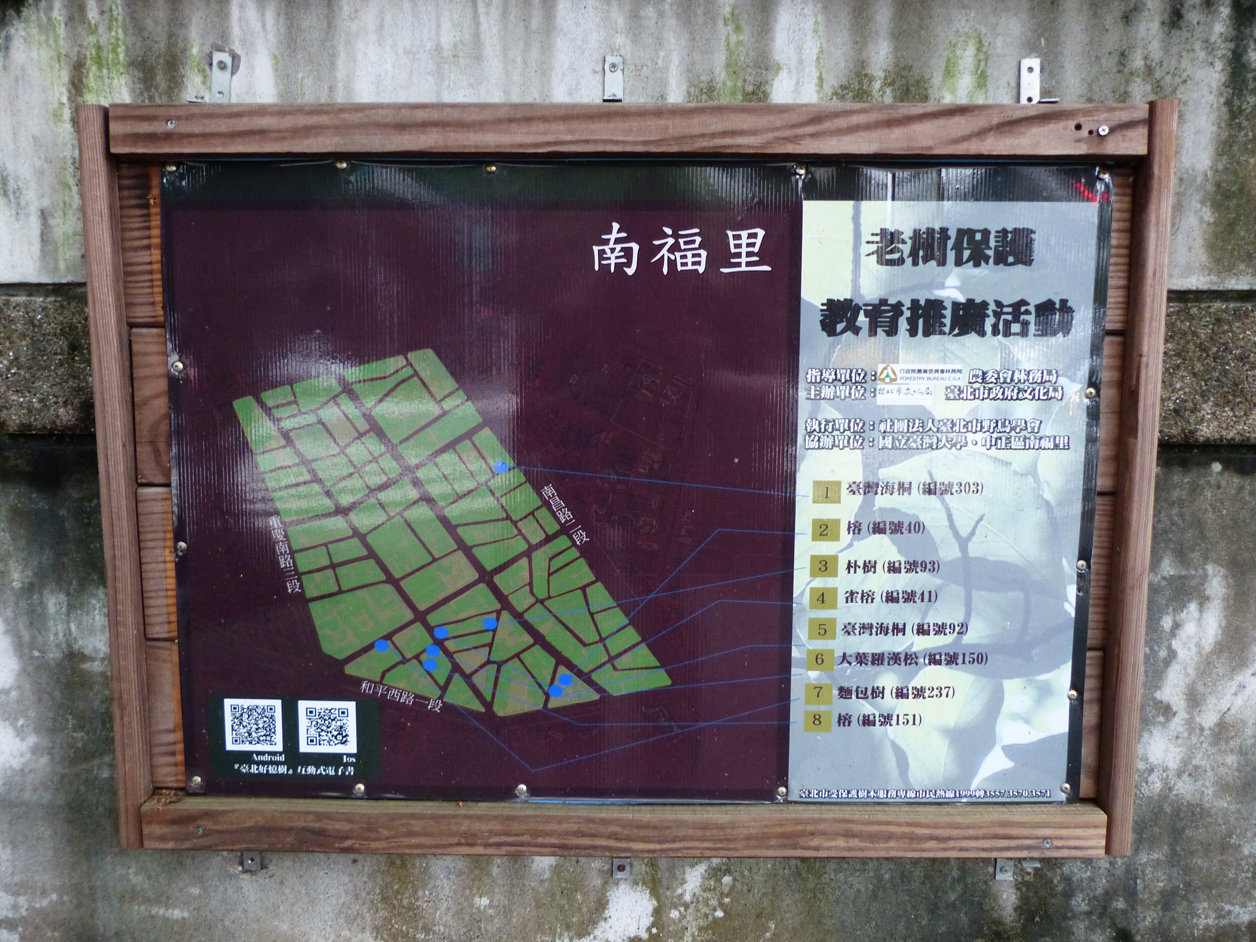 臺北市中正區南福里的保護教育推廣用老樹地圖，行政院農業委員會林務局指導，臺北市政府文化局主辦，臺北市野鳥學會執行。設於牯嶺街與福州街路口，福州街20號東北角牆上。